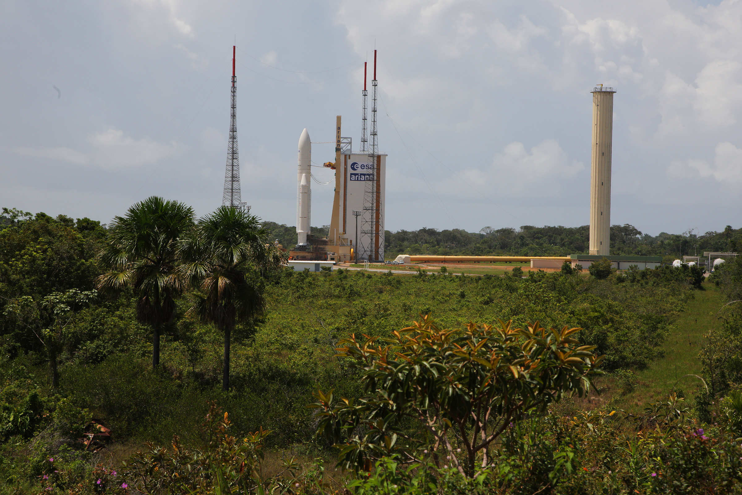 Raumfrachter ATV-4 "Albert Einstein" Ariane 5ES mit "OCAM"-Kamerasystem Gemeinsam mit Partnern hat das DLR in den vergangenen Jahren das On-Board-Kamerasystem "OCAM" entwickeln lassen, mit dem sich der Flug der Ariane-Rakete verfolgen lässt. Das OCAM-System ist eine eigenständige Komponente, die auf der Ariane 5 als Passagier mitfliegt. Der Höhepunkt des OCAM-Einsatzes wird die Beobachtung des Absetzens von ATV-4 im Orbit sein. Für dieses Ereignis wird OCAM dreidimensionale Video-Sequenzen aufnehmen, um das dynamische Verhalten der Raumfahrzeuge während der Separationsphase zu studieren. Damit eröffnet sich für die Ingenieure des ATV-Projekts eine völlig neue Möglichkeit, den Erfolg ihrer Arbeit zu beobachten und zugleich für die Zukunft wichtige neue Erfahrungen zu sammeln. Credit: DLR/Thilo Kranz (CC-BY 3.0) 2013